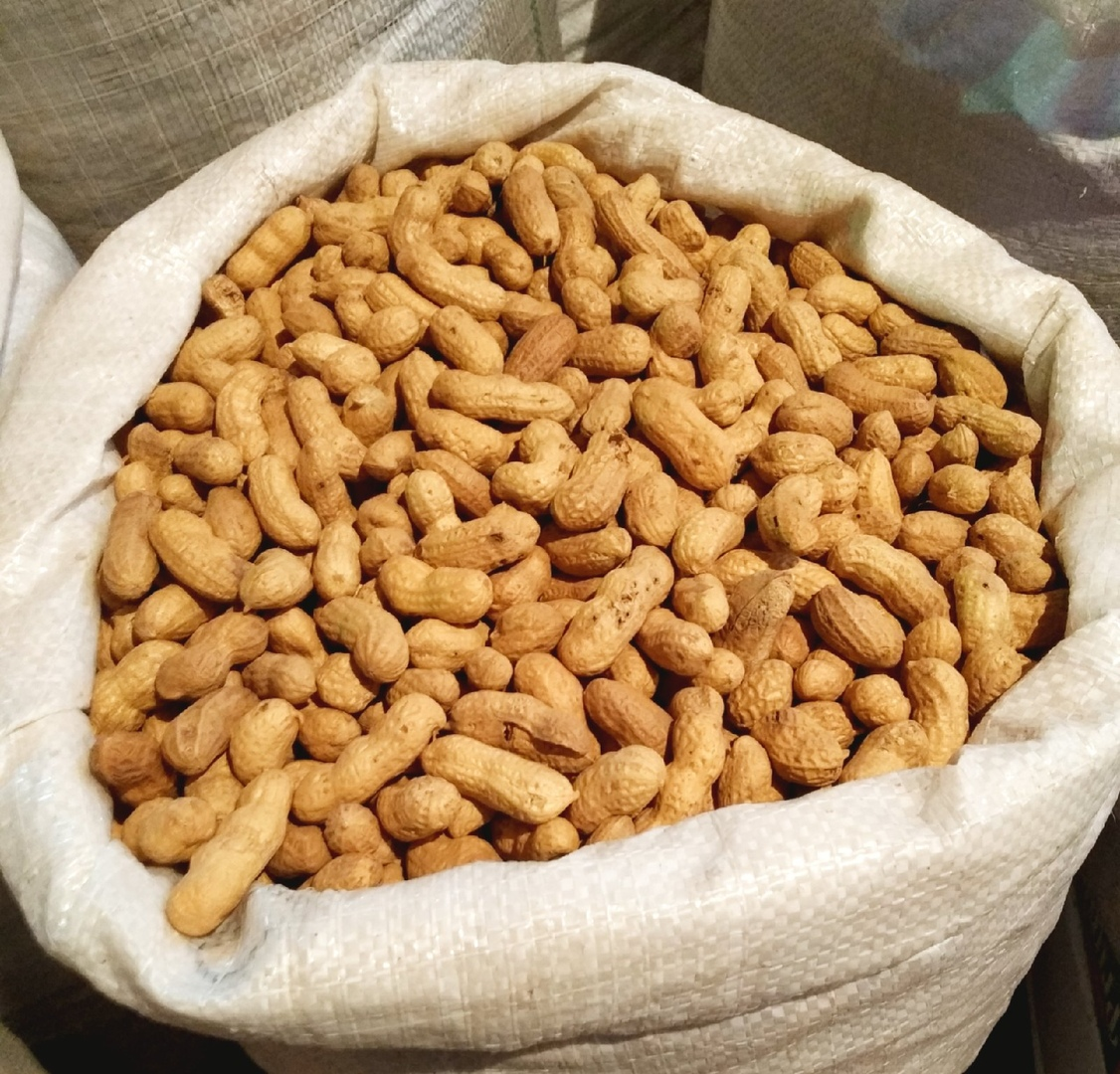 Татарча/tatarça: Арахис. Рәсем 2019 елда Яшел Үзәндә ясалган.